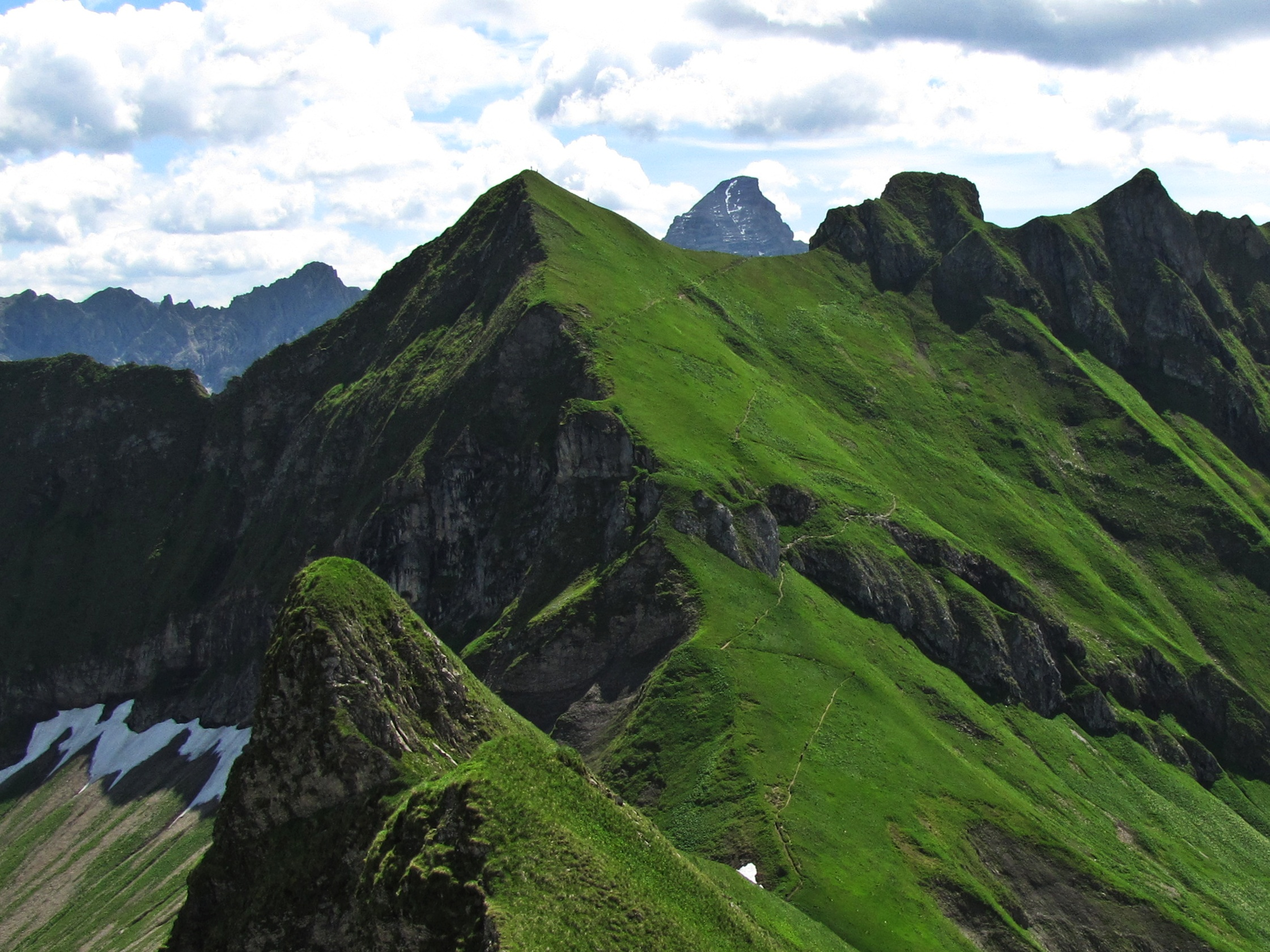 Blick vom Lachenkopf nach Osten zum Laufbacher Eck (2178 m) und Rotkopf (2194 m).